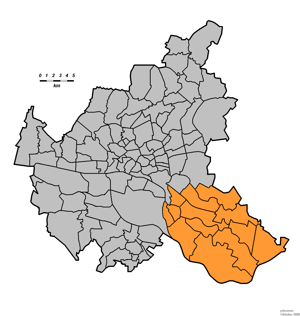 Bezirk Bergedorf in Hamburg.